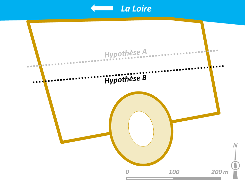 hypothèses d'emplacement de la voirie est-ouest dans le castrum